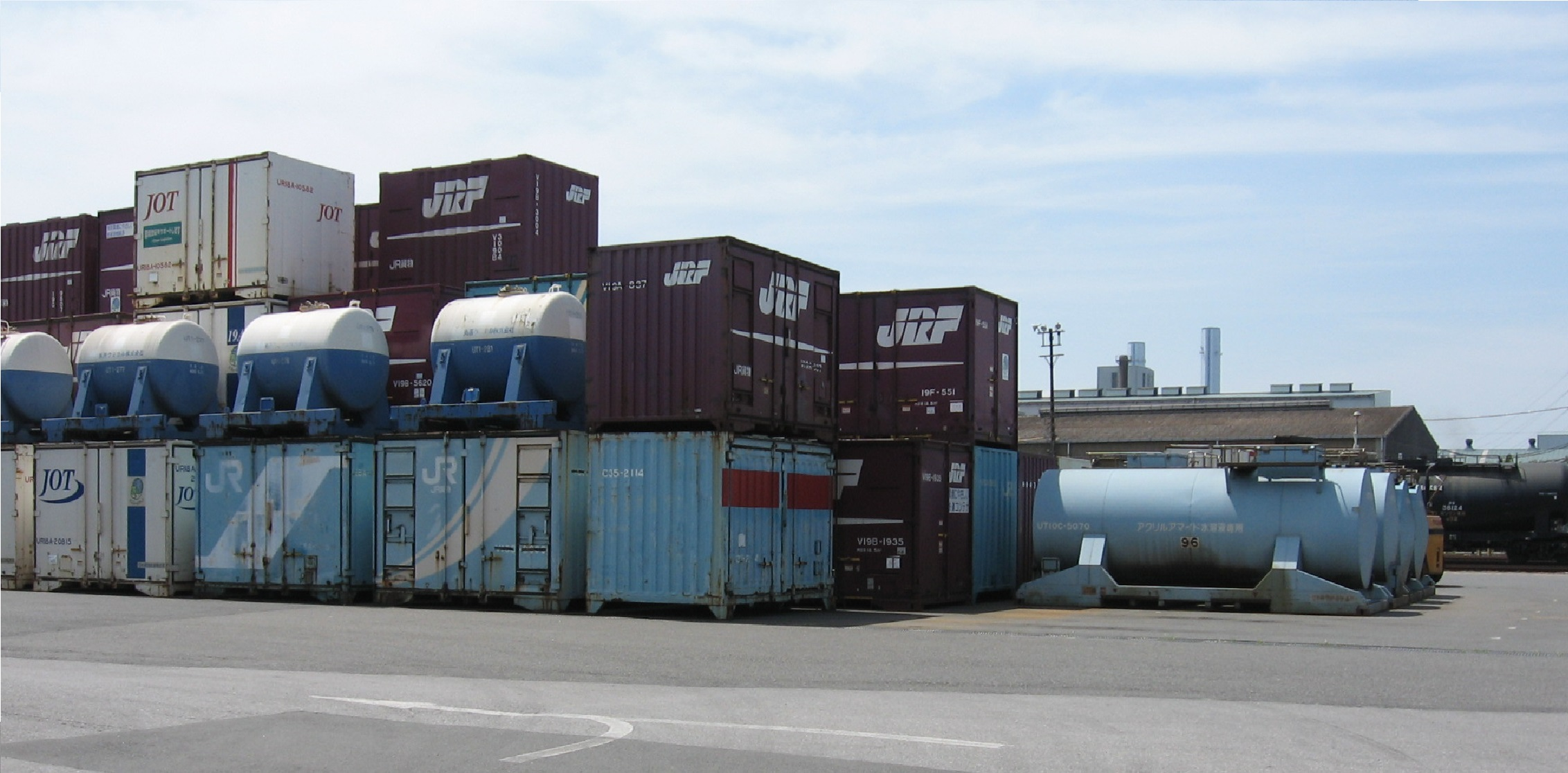 今では貴重品となってきている、旧形式UTI等の貴重なコンテナも取り扱っている。